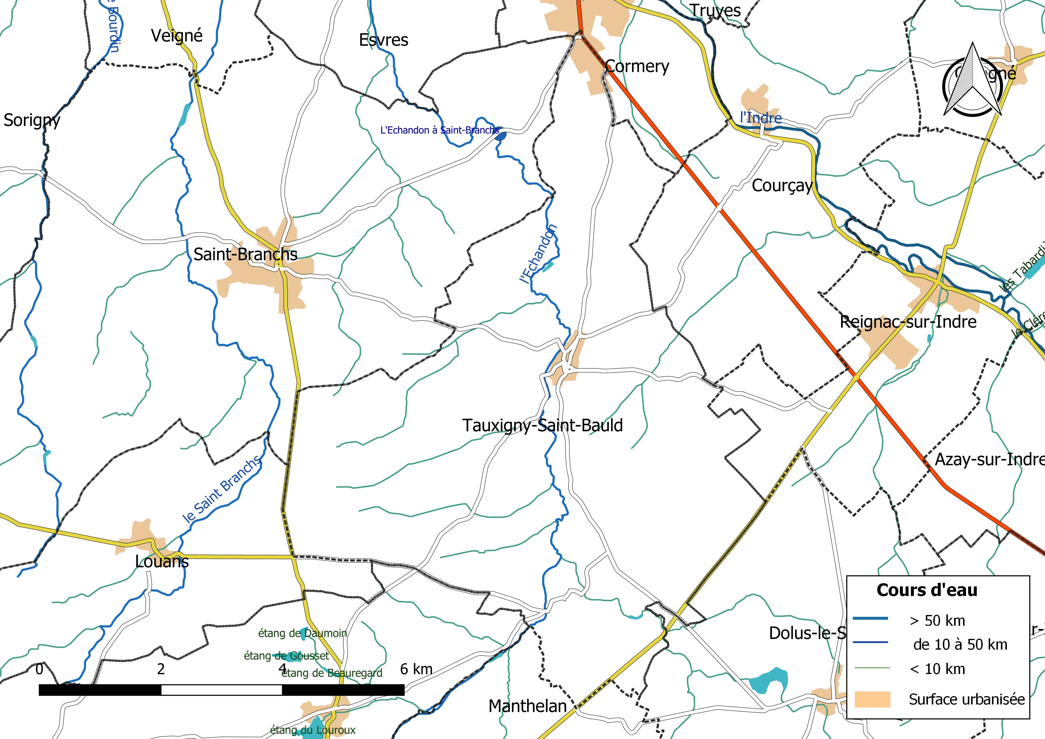 Carte du réseau hydrographique de la commune de Tauxigny-Saint-Bauld (France).